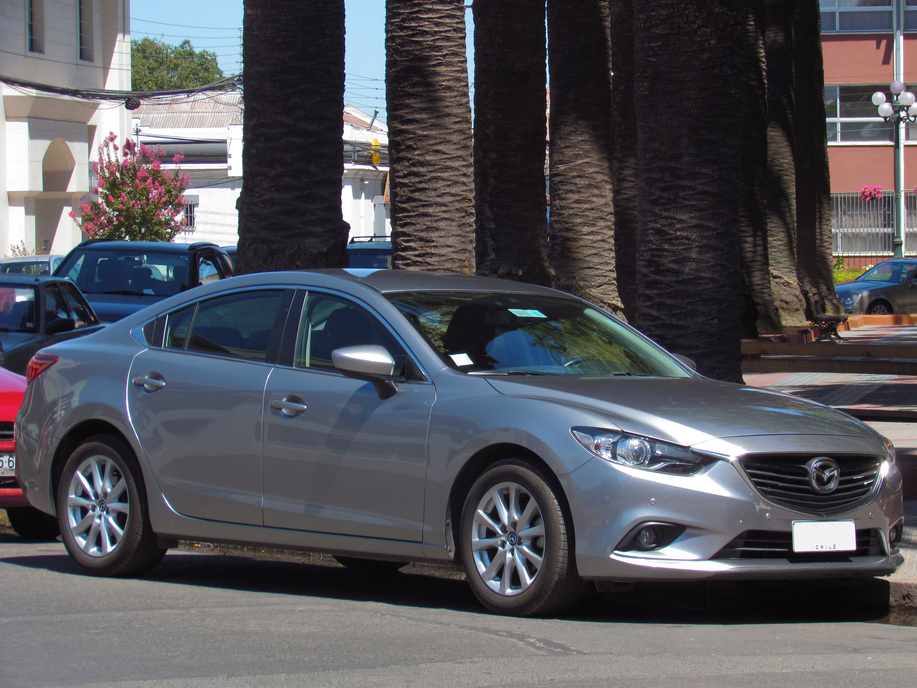 Mazda 6 2.0 2013